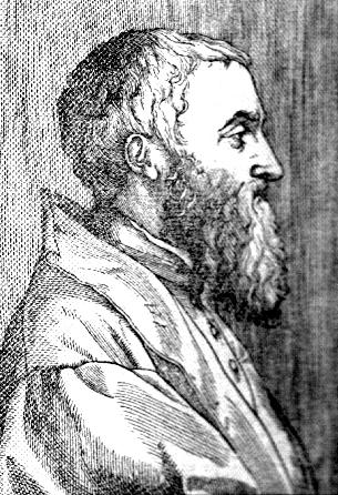 Fracnesco Marcolini da Forlì